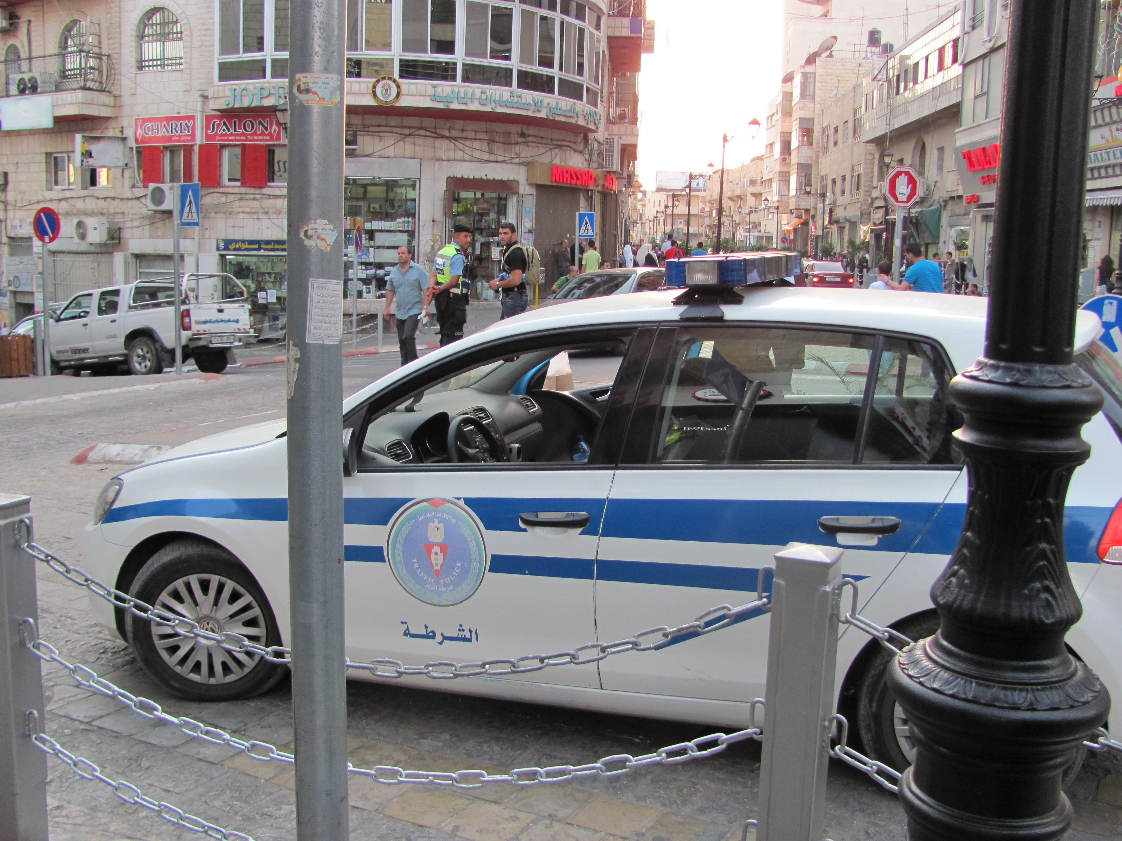 Vehículo de la policía palestina en el Centro de Ramallah